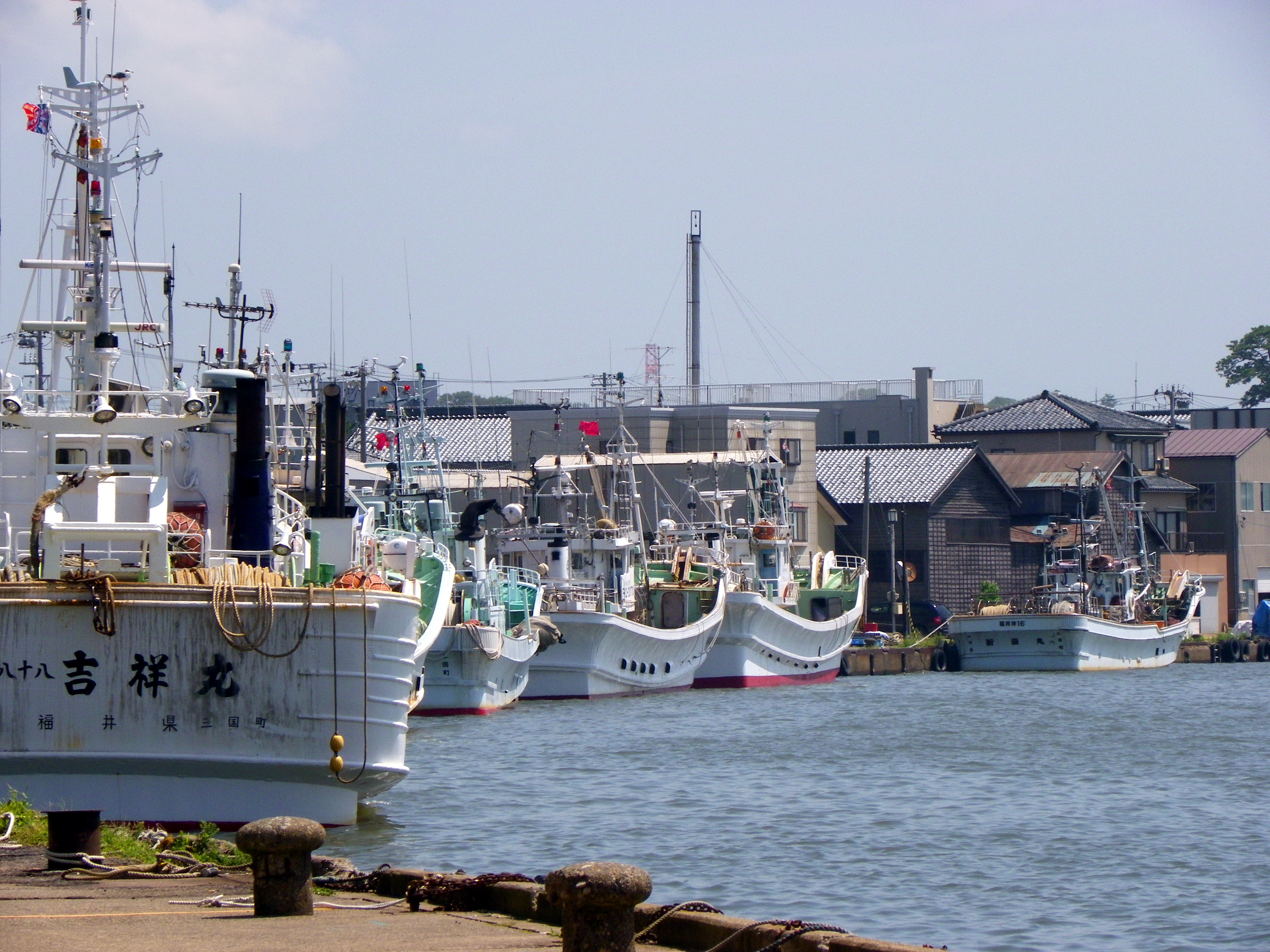 福井港（三国漁港）